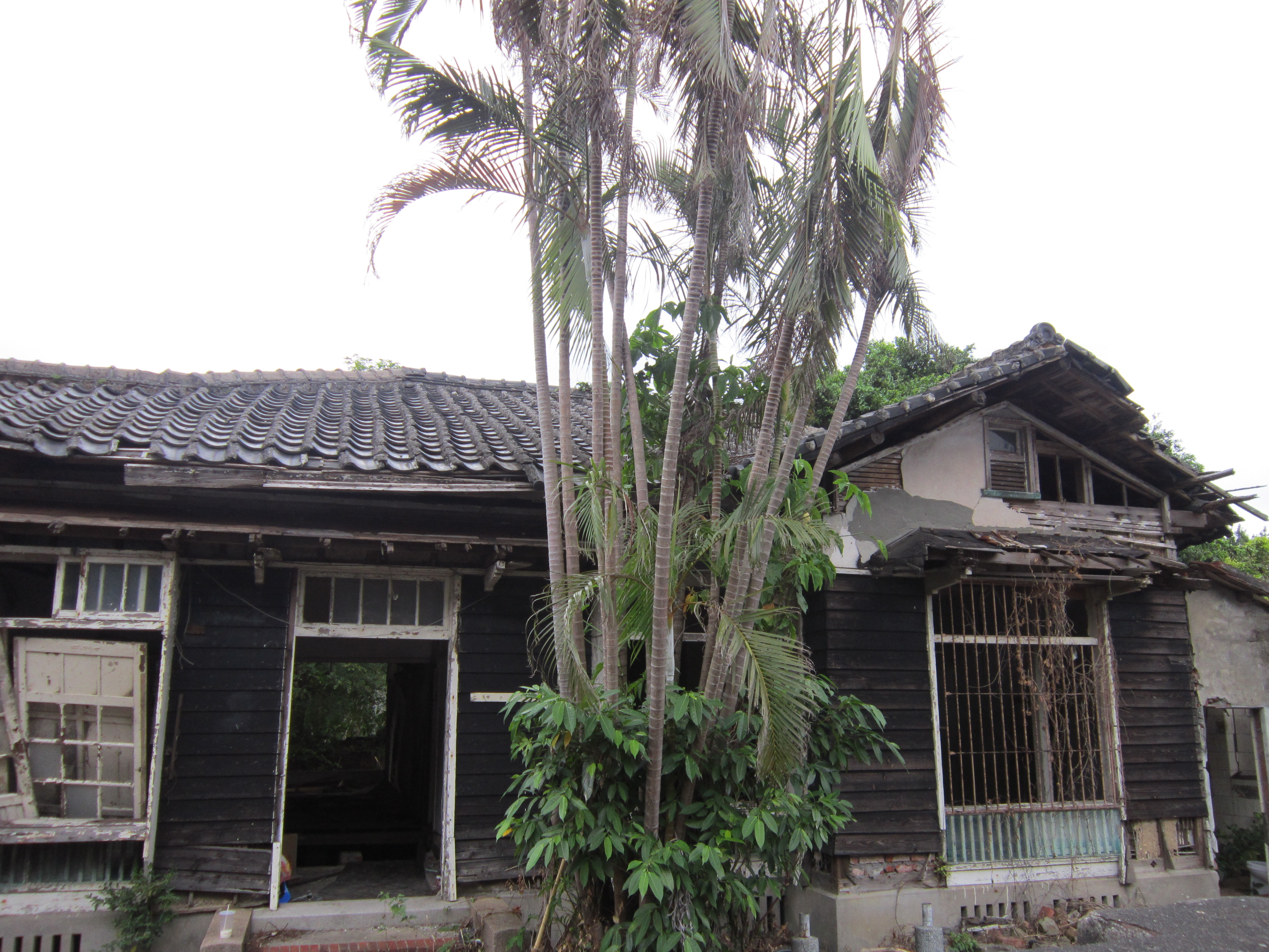 基隆要塞司令部校官眷舍創建於西元1928 年（日昭和3年），原有兩間日式房舍，屋頂覆有日式黑燻瓦，2015年蘇迪勒颱風後，靠基隆市榮民服務處一側的那間完全坍塌僅剩地基，現雜草叢生期待重生中。